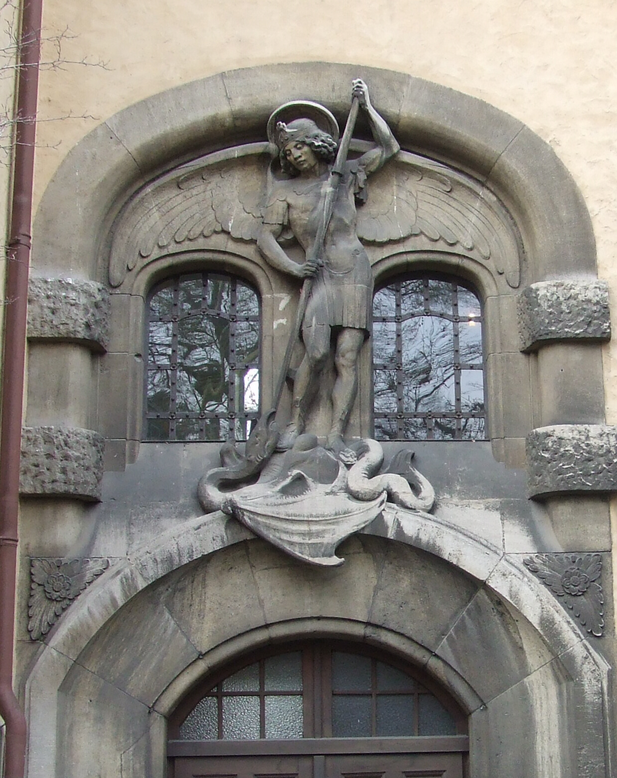 Michaels-Portal des Siebold-Gymnasiums Würzburg